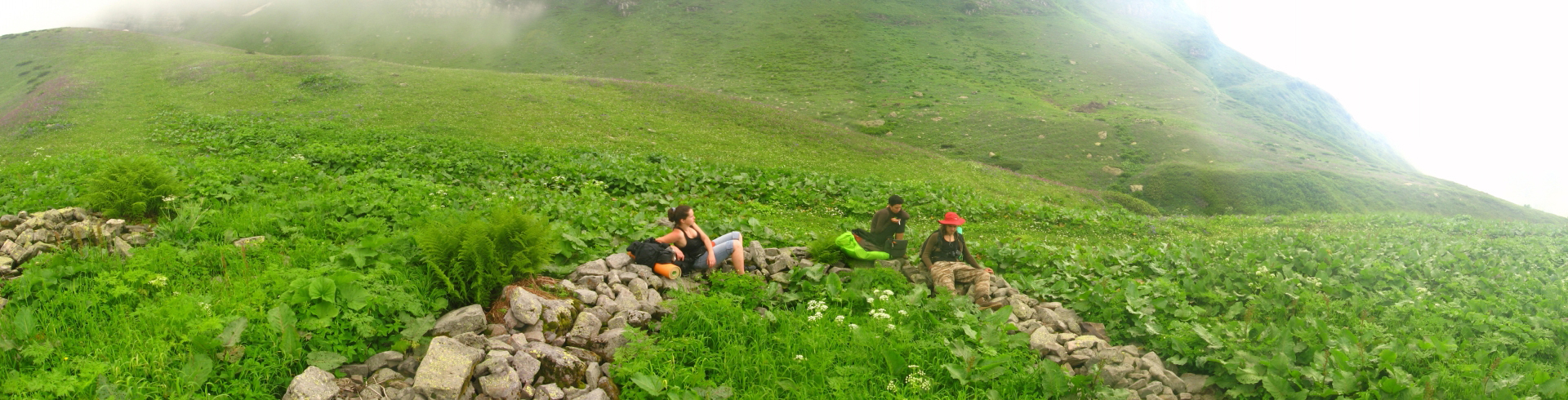 Древние сооружения из небольших необработанных камней в виде оград.